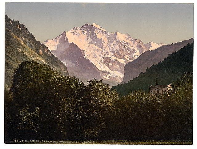 Jungfrau bei Sonnenuntergang, ca. 1900